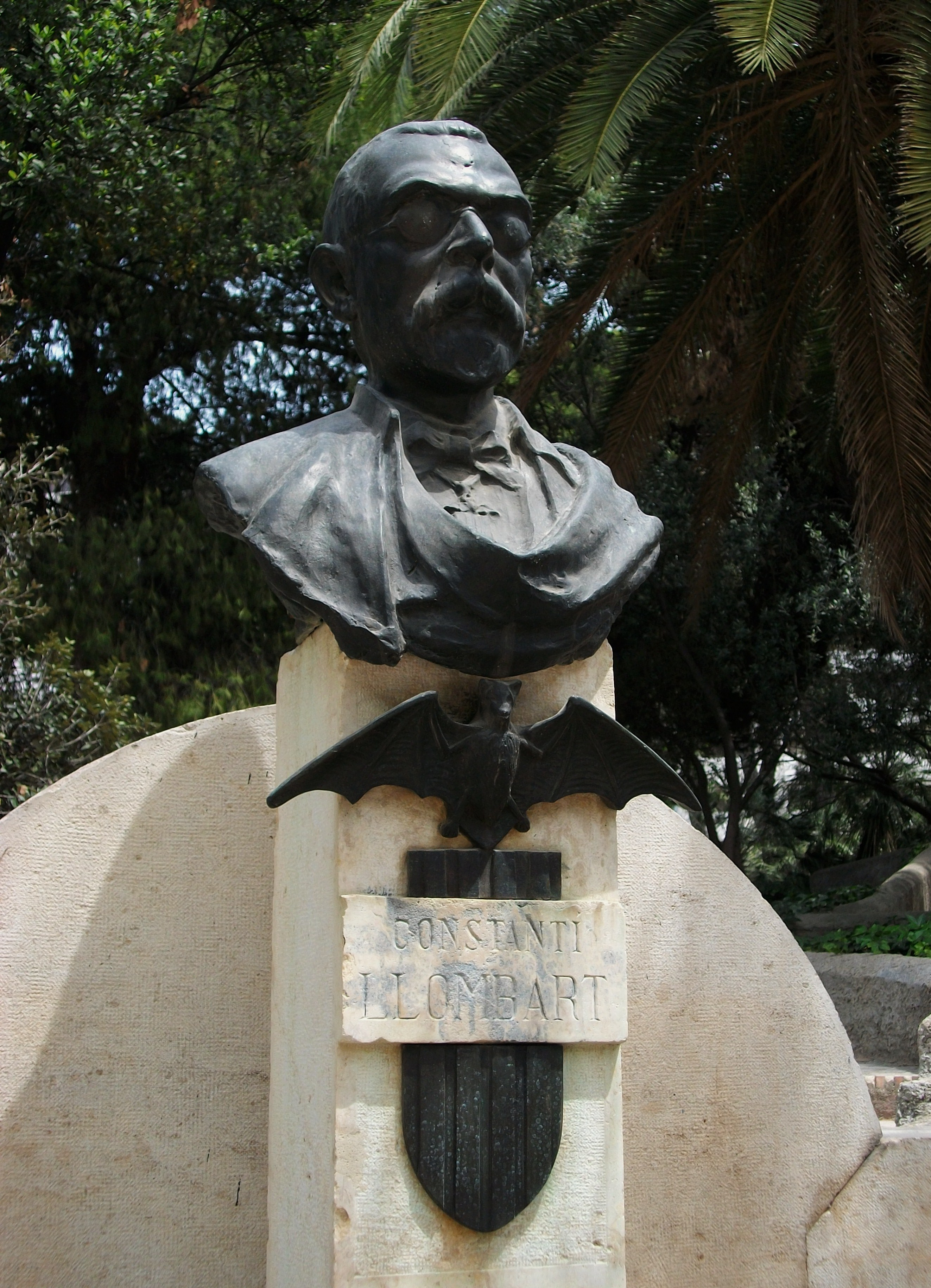 Bust de Constantí Llombart als jardins del Real de València.